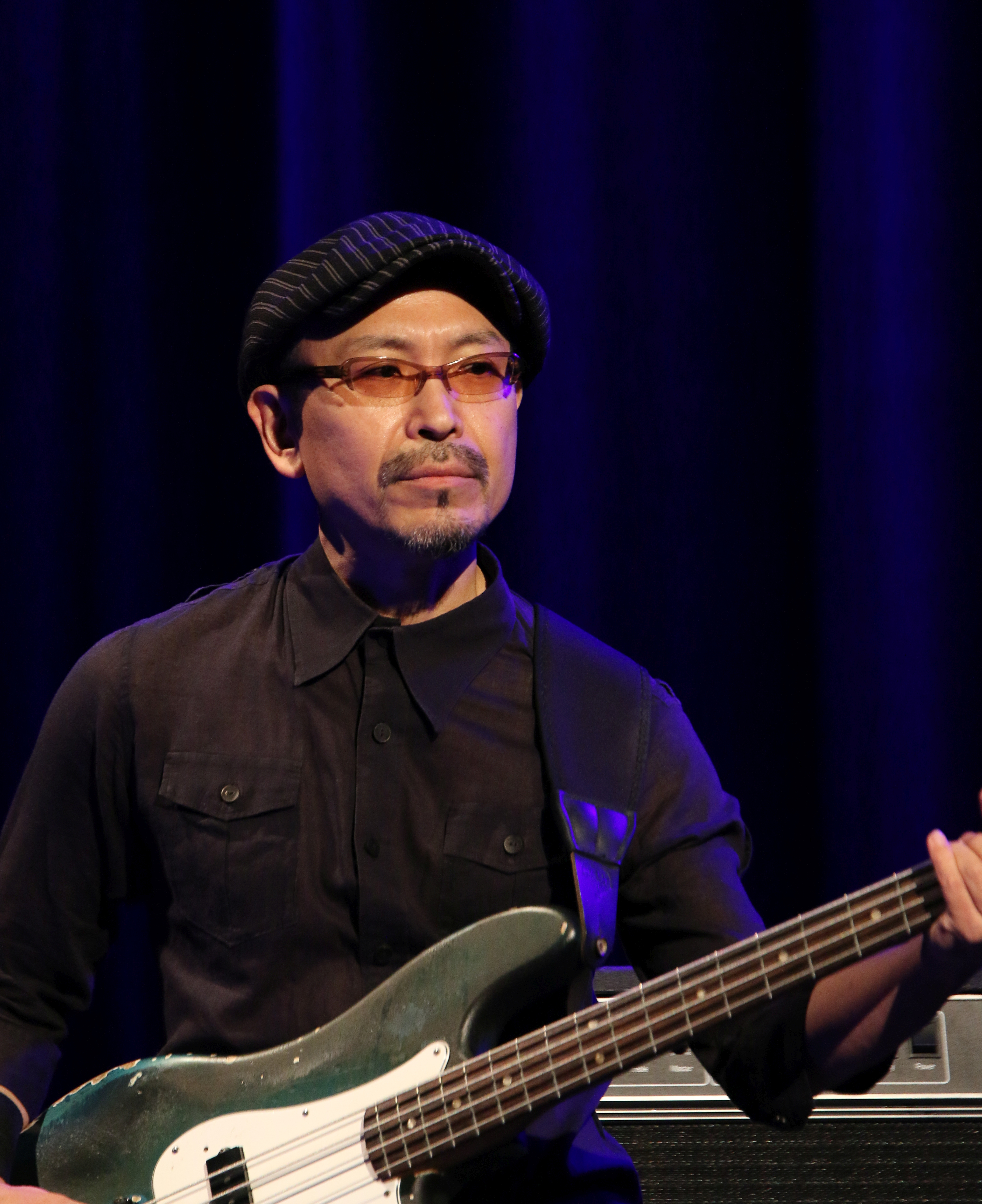 46. Deutsches Jazzfestival Frankfurt 2015: Hope: Mitsuru Nasuno